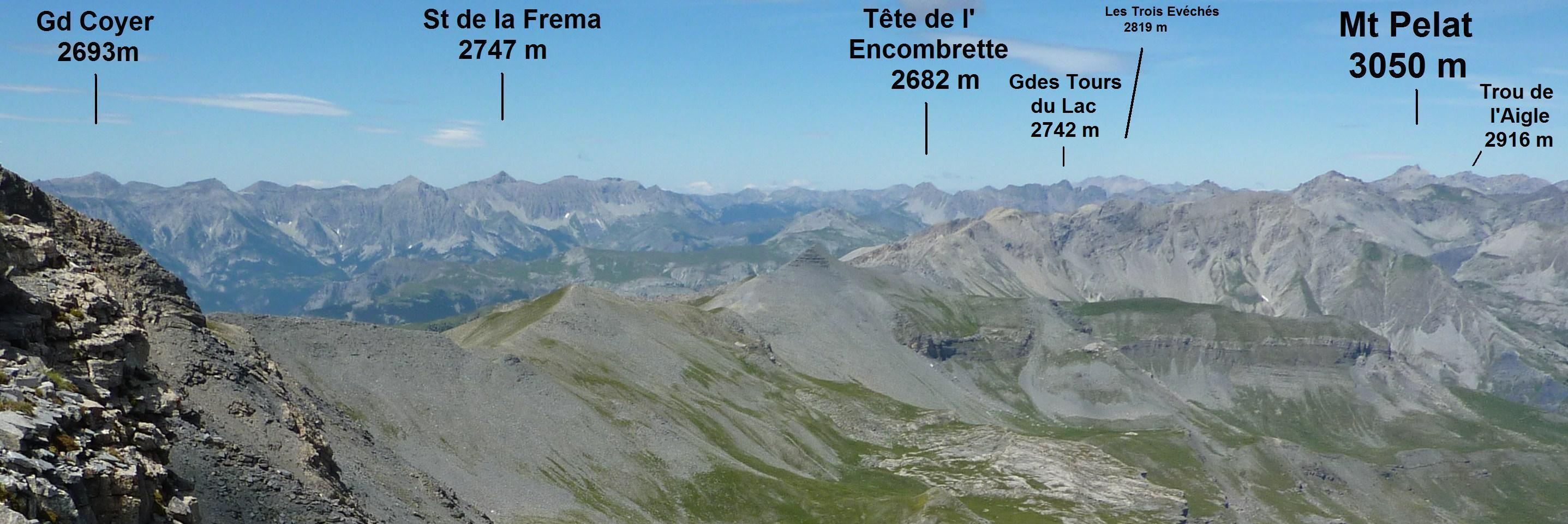 Massif du Pelat vu du sud-est à partir du mont Mounier (2817 m) situé à 25 km du mont Pelat (3050 m). Photo prise le 27 juillet 2010 à 11h38.